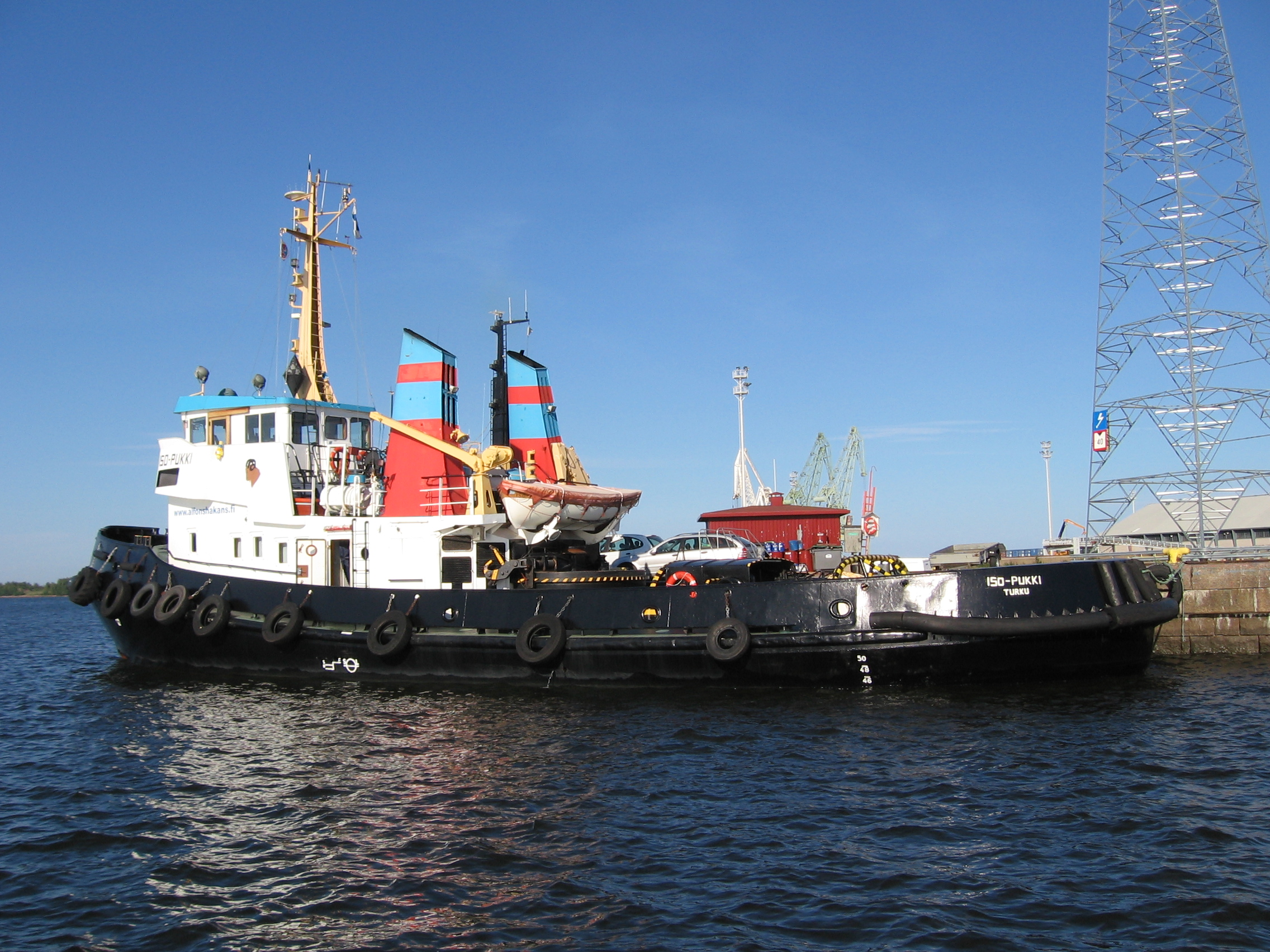 Hinaaja Iso-Pukki Kotkan Kantasatamassa.